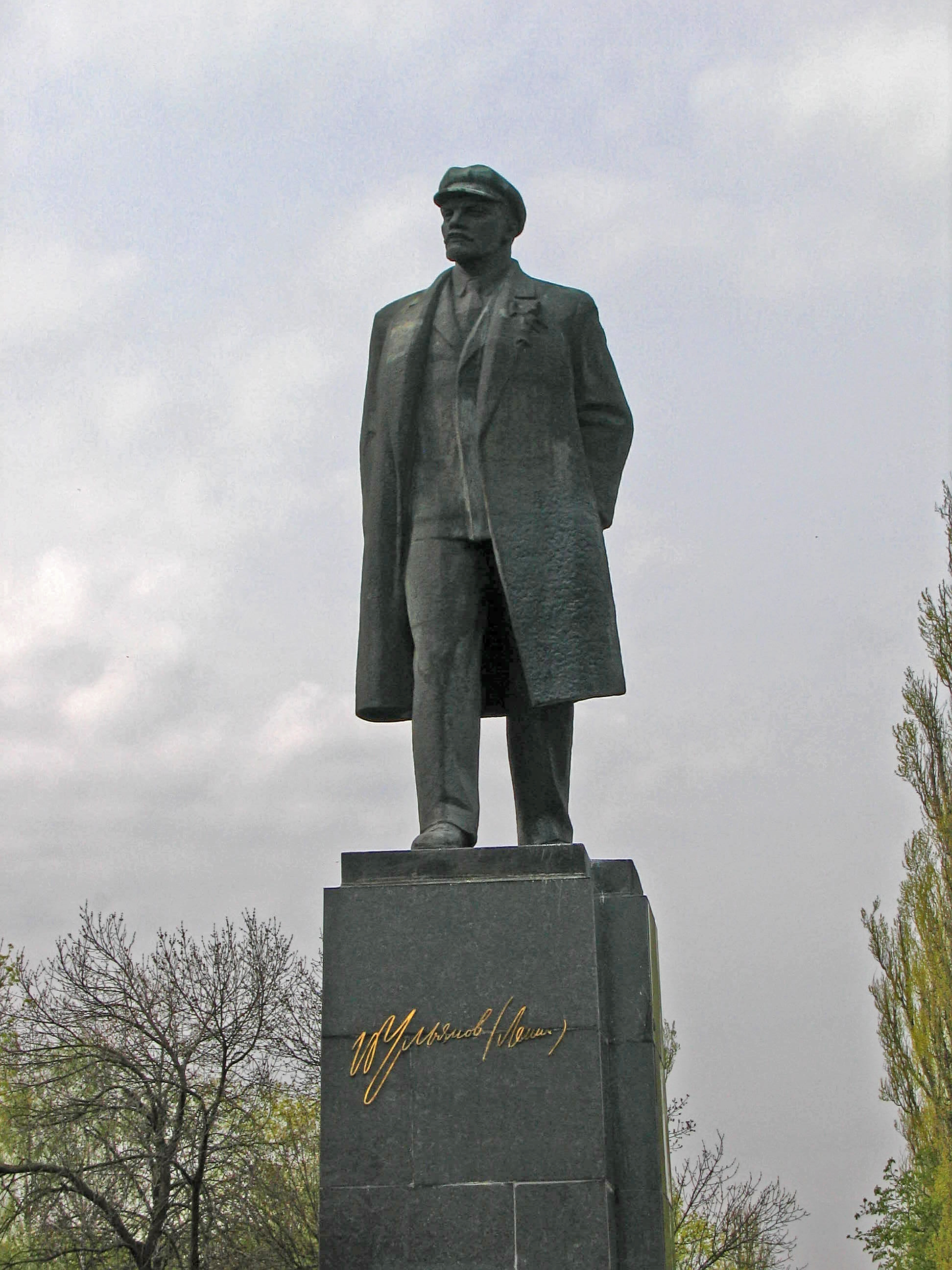 Пам’ятник В. І. Леніну (зруйнований), Чернігів, проспект Миру